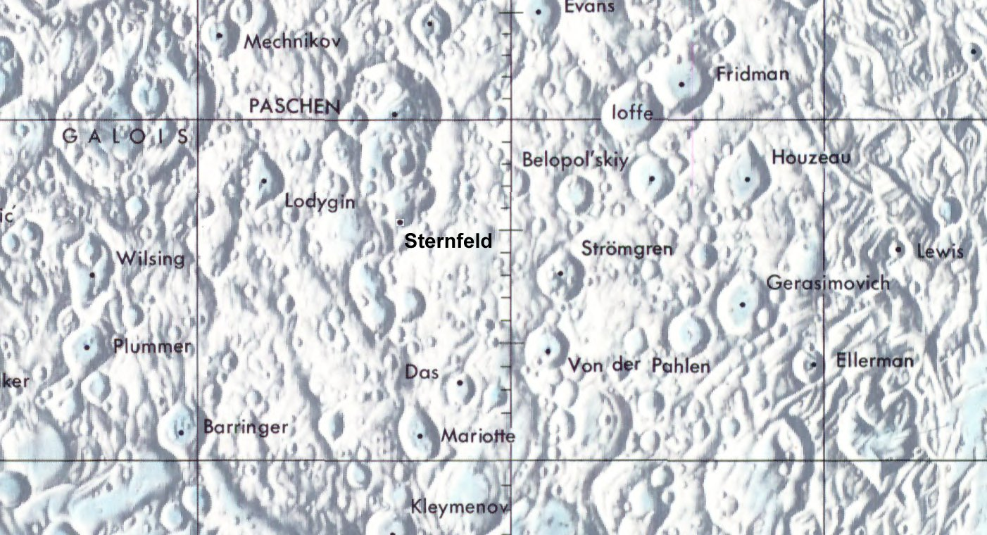 Cráter lunar Sternfeld. Localización. (Lunar Chart LPC1. Second Edition)